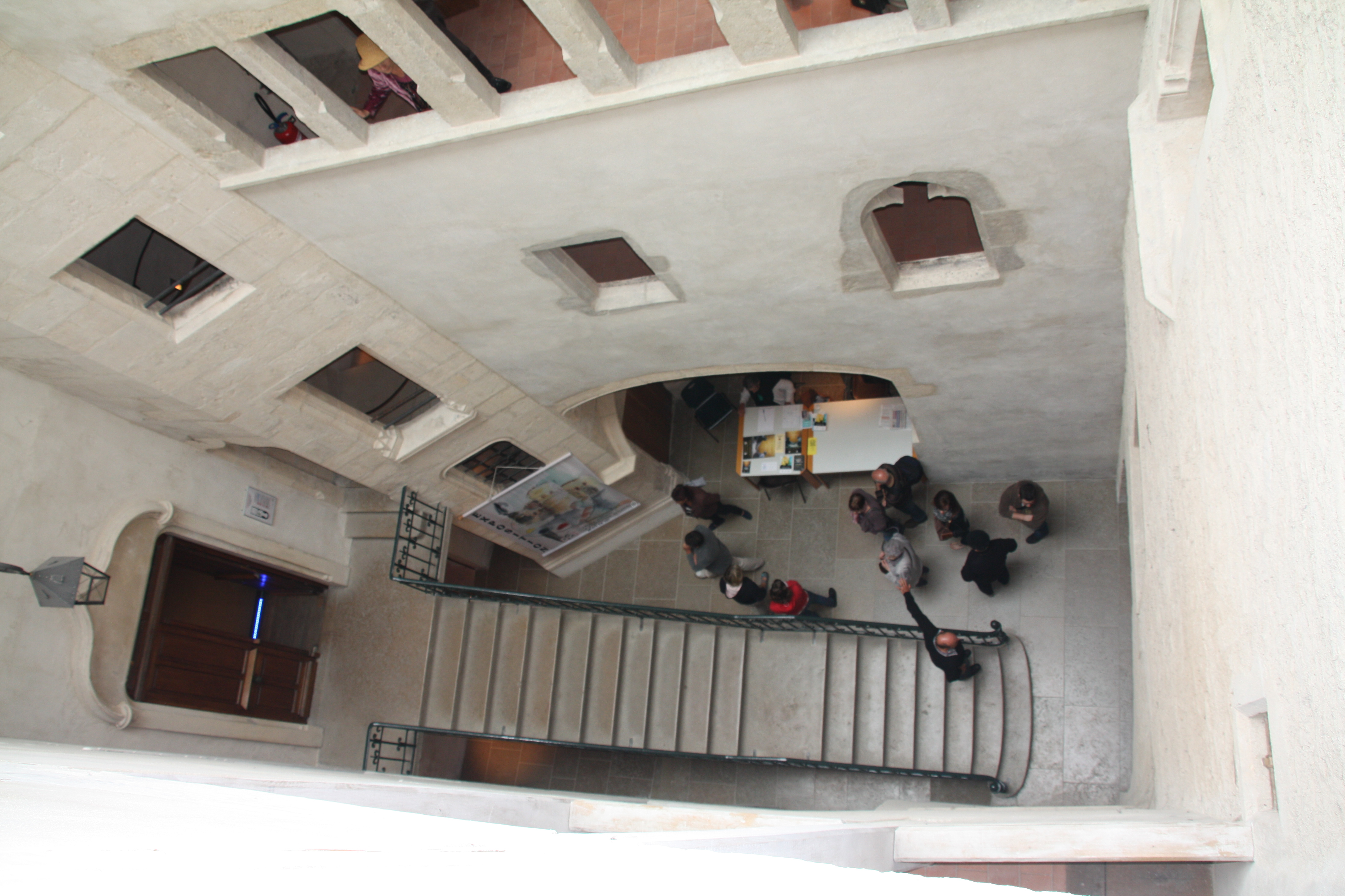 Cour intérieure du Château des Tours à Anse.